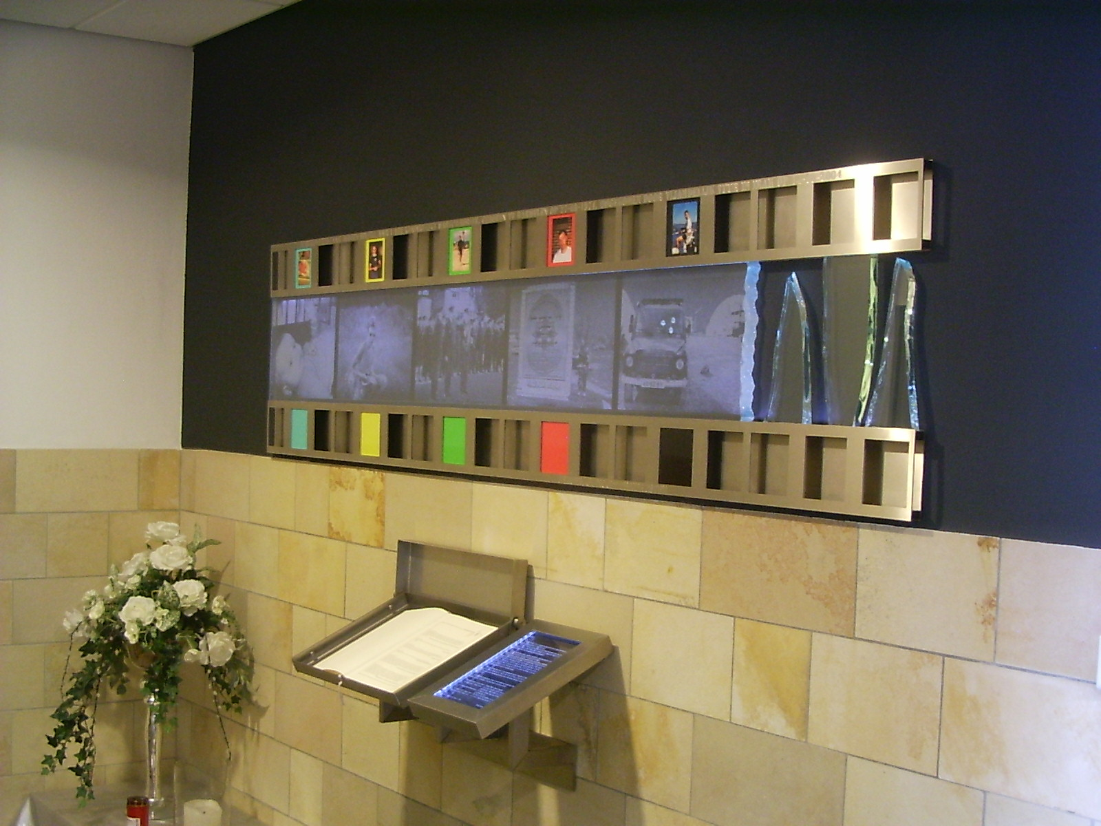 Apeldoorn, Koning Willem III kazerne, Jeroen Severs monument